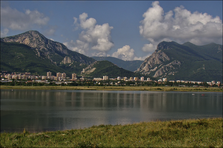 Враца